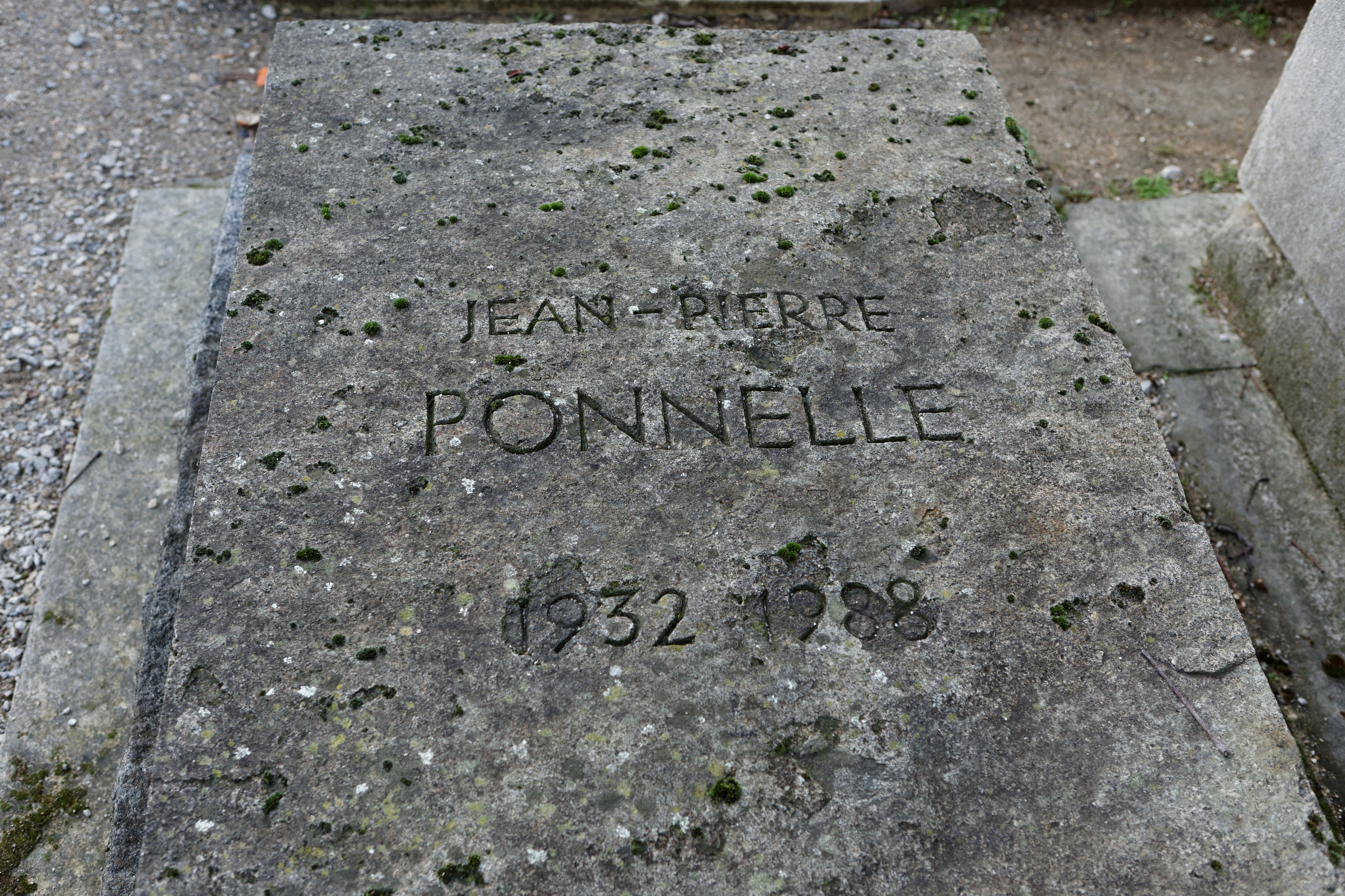 Sépulture de Jean-Pierre Ponnelle 1932-1988), metteur en scène et décorateur d'opéra.